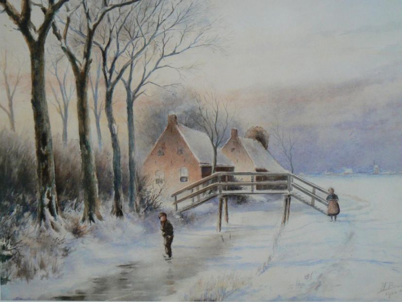 Aquarel van Hendrik Bruining (1850-1925). Afbeelding: winterlandschap, jongetje op het ijs, bij ‘Het Heechhout’ te Aalsum, ten noorden van Dokkum. Datering: 1900. Deze aquarel bevindt zich in privé-bezit.